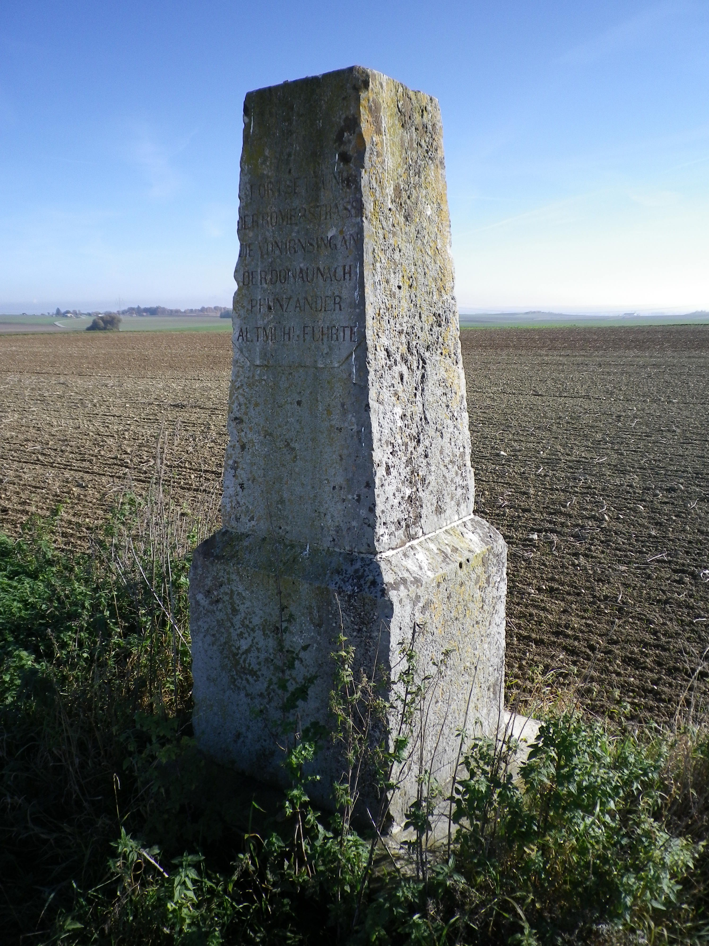 Gedenkstein um 1860 zur Erinnerung an die Römerstraße von Irnsing nach Pfünz. Lage: östlich von Theißing, Kreppenäcker. Inschrift: Fortsetzung der Römerstrasse die von Irnsing an der Donau nach Pfünz an der Altmühl führte This is a photograph of an architectural monument.